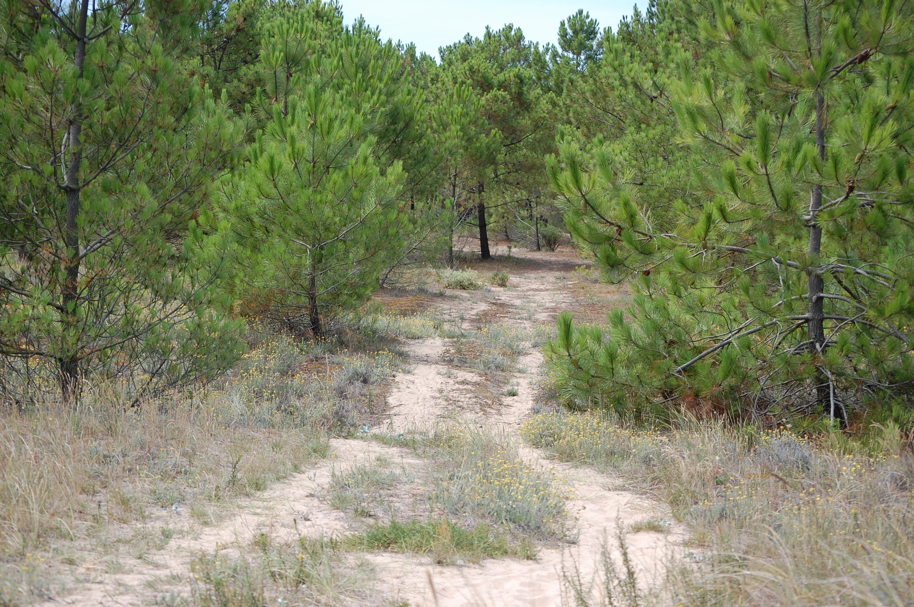 2009-07_Oleron_190